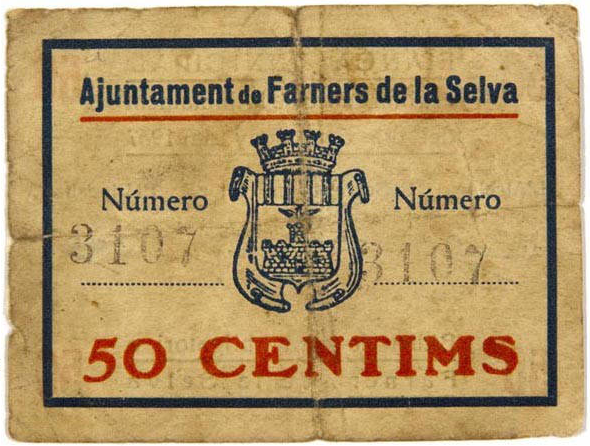 Paper moneda emès per l'Ajuntament de Farners de la Selva (actualment Santa Coloma de Farners).